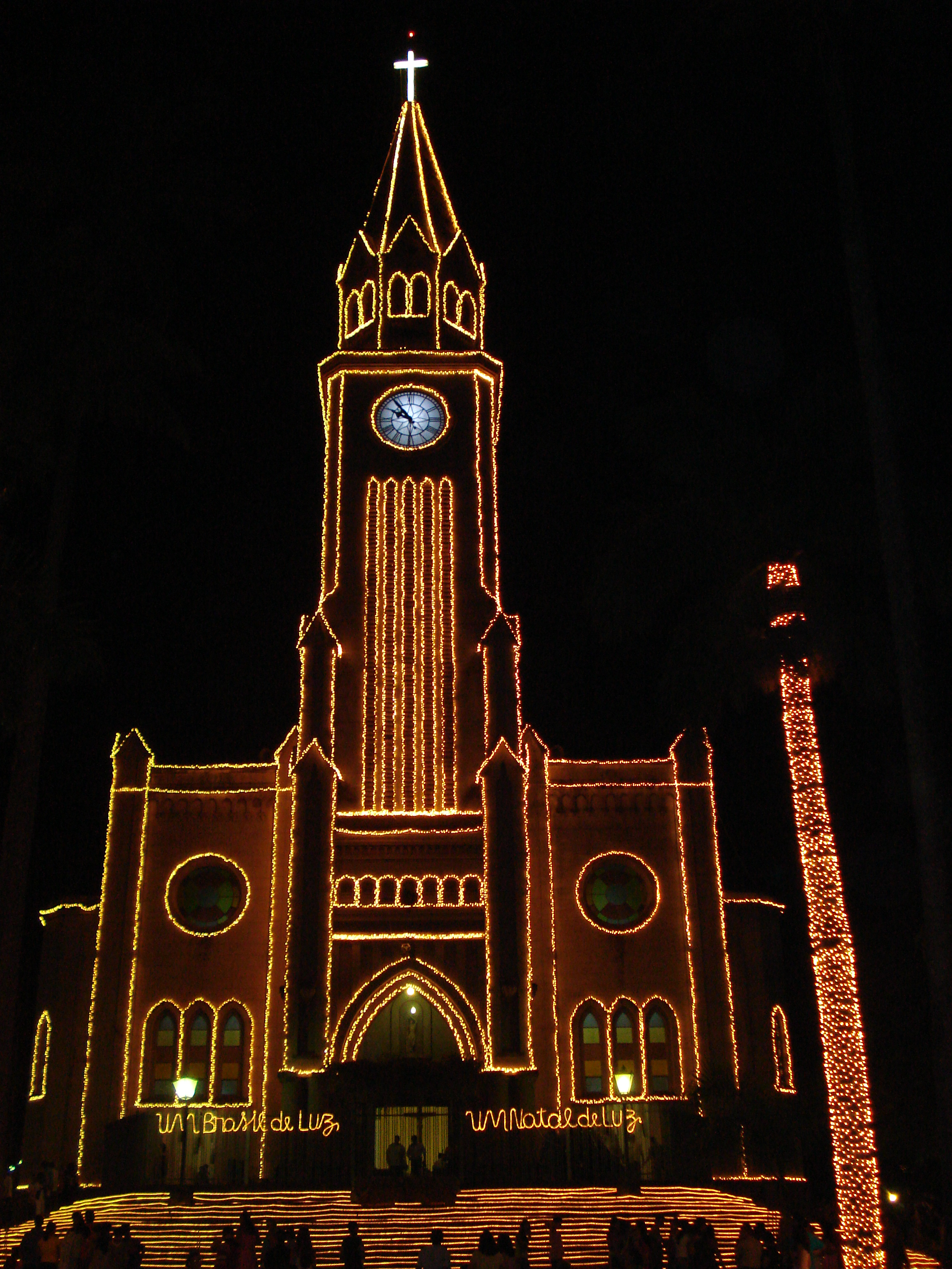 Igreja matriz da cidade de Piraju-SP, enfeitada para festas natalinas.